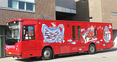 Billede af Skive Biblioteks nye bogbus fra 2008